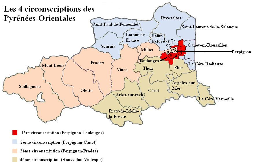 Circunscripcions electorals dels Pirineus Orientals.